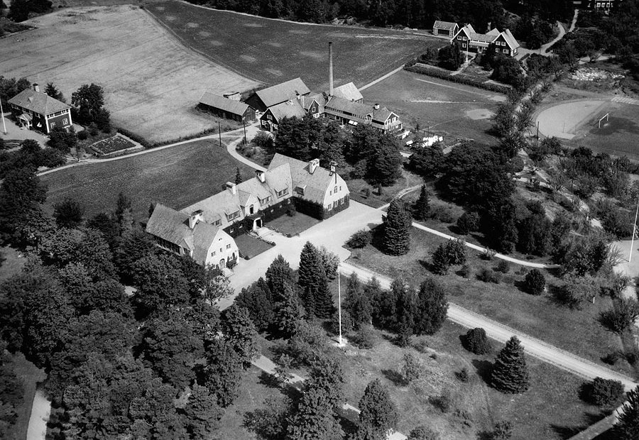 Flygfoto över Låssa med Sunnerdahls praktiska ungdomsskola. Bildnr: FB-0779